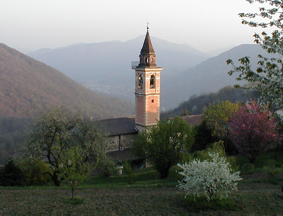 Il campanile della chiesa di San Rocco a Bedigliora